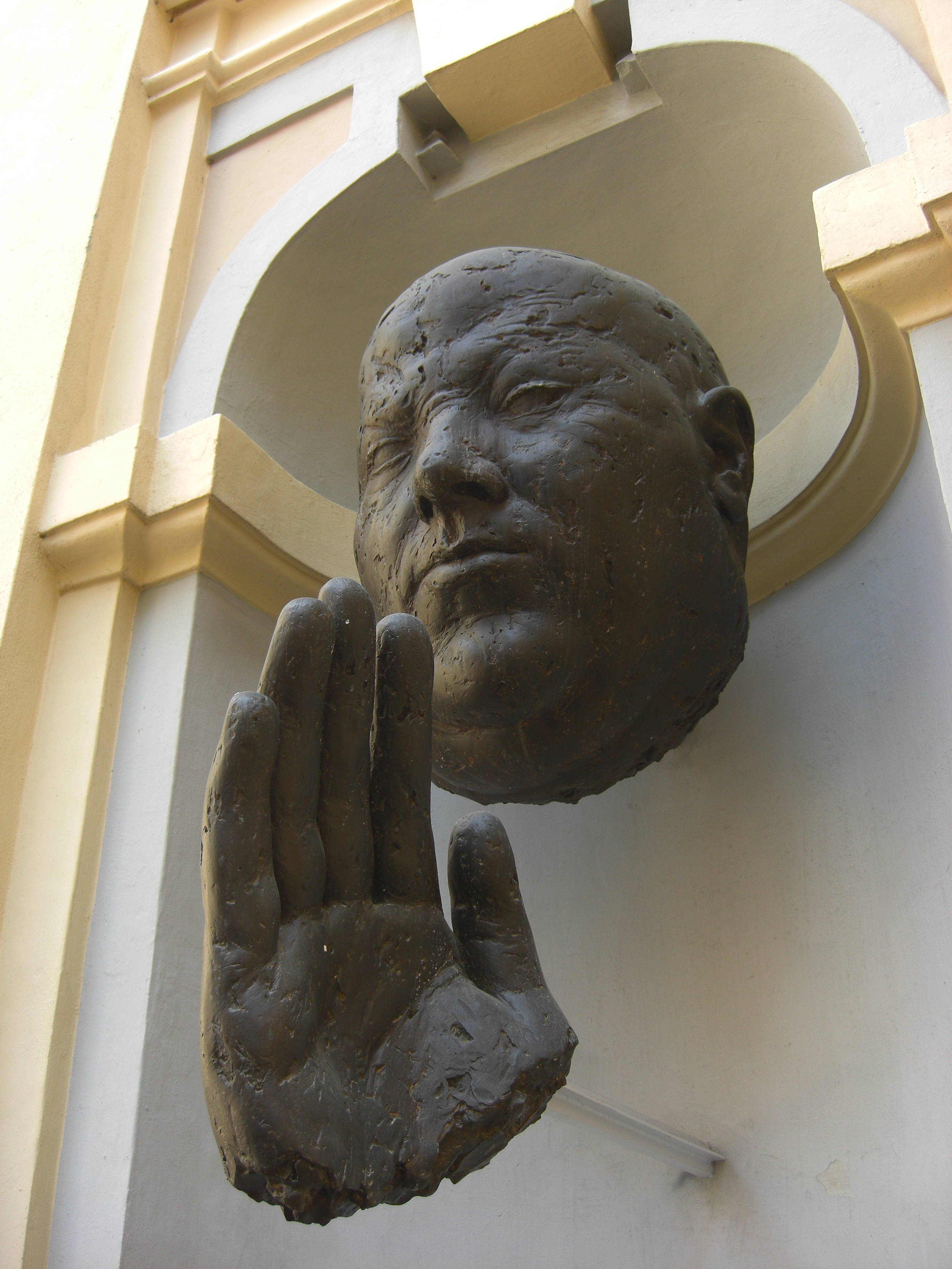 Altes Landhaus, Innsbruck, Skulptur Die Segnung von Lois Anvidalfarei an der Fassade der Georgskapelle